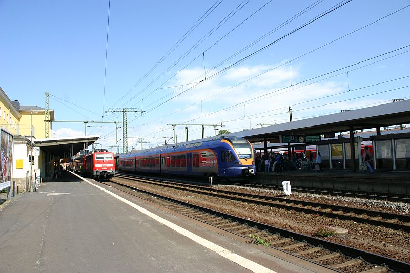 Bahnhof in Fulda; Gleise 1 bis 3